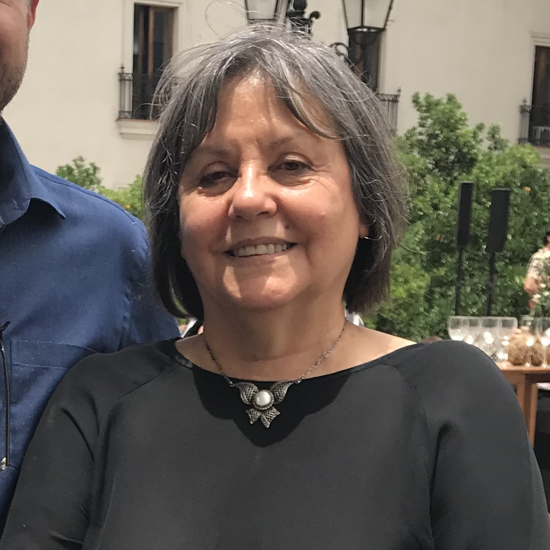 Diamela Eltit en ceremonia entrega Premio Nacional de Literatura Chile 2018 - Palacio de La Moneda, Santiago, Chile, 19 de diciembre de 2018